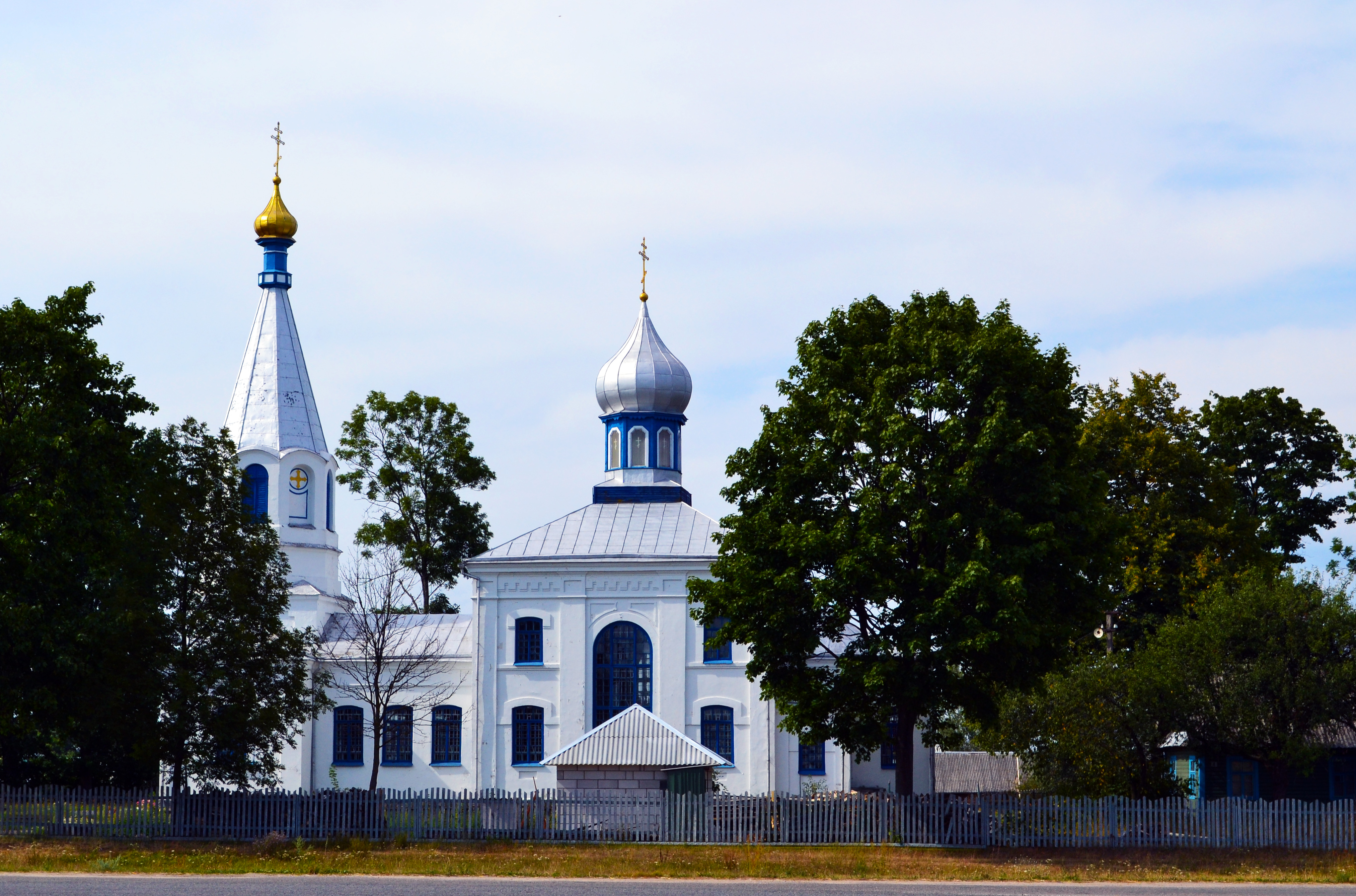 Беларуская (тарашкевіца): Крыжаўзьвіжанская царква (Аранчыцы) This is a photo of Belarusian heritage monument. Reference number: 113Г000593 ( WLM)